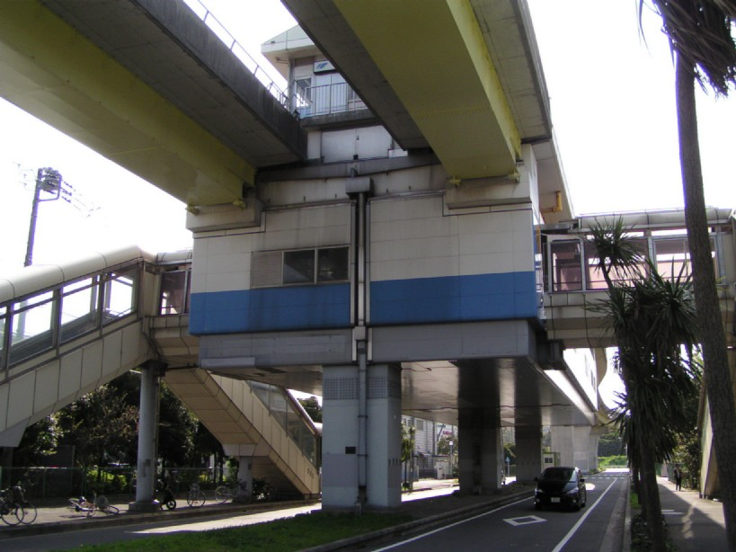 2005年4月17日に投稿者がja:産業振興センター駅で撮影。